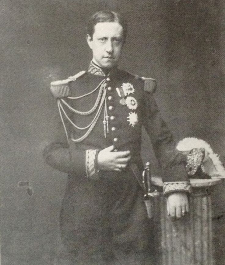 Autore: sconosciuto. Fonte: Descrizione: Fotografia di Francesco di Borbone Sicilia conte di Trapani (1827-1892).